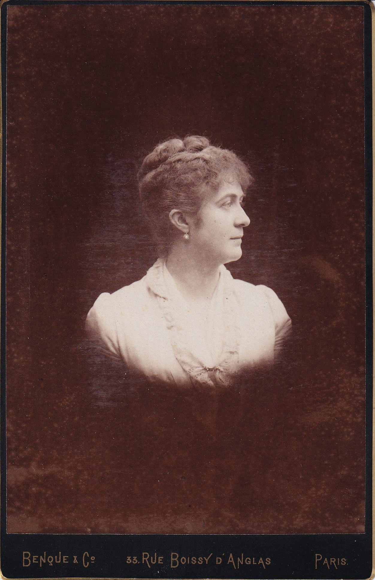 Marguerite Poelaert, née le 7 juin 1860 à Laeken (Bruxelles) et décédée en 1917, épousa à Bruxelles le 20 août 1885, Maurice Pauwels, né le 27 octobre 1861, à Molenbeek-Saint-Jean (Bruxelles) et décédé en 1912, fils de François Pauwels, fondateur et administrateur général de la Compagnie générale de matériel de chemin de fer (né le 13 mars 1816 à Bruxelles et décédé le 4 avril 1884 à Paris et inhumé au cimetière de Laeken) et de Marie Thibou (1839-1903). Dont une fille unique : a) Marthe Pauwels, née le 10 septembre 1886 à Bruxelles et décédée à Naples le 27 novembre 1907 âgée de 21 ans.